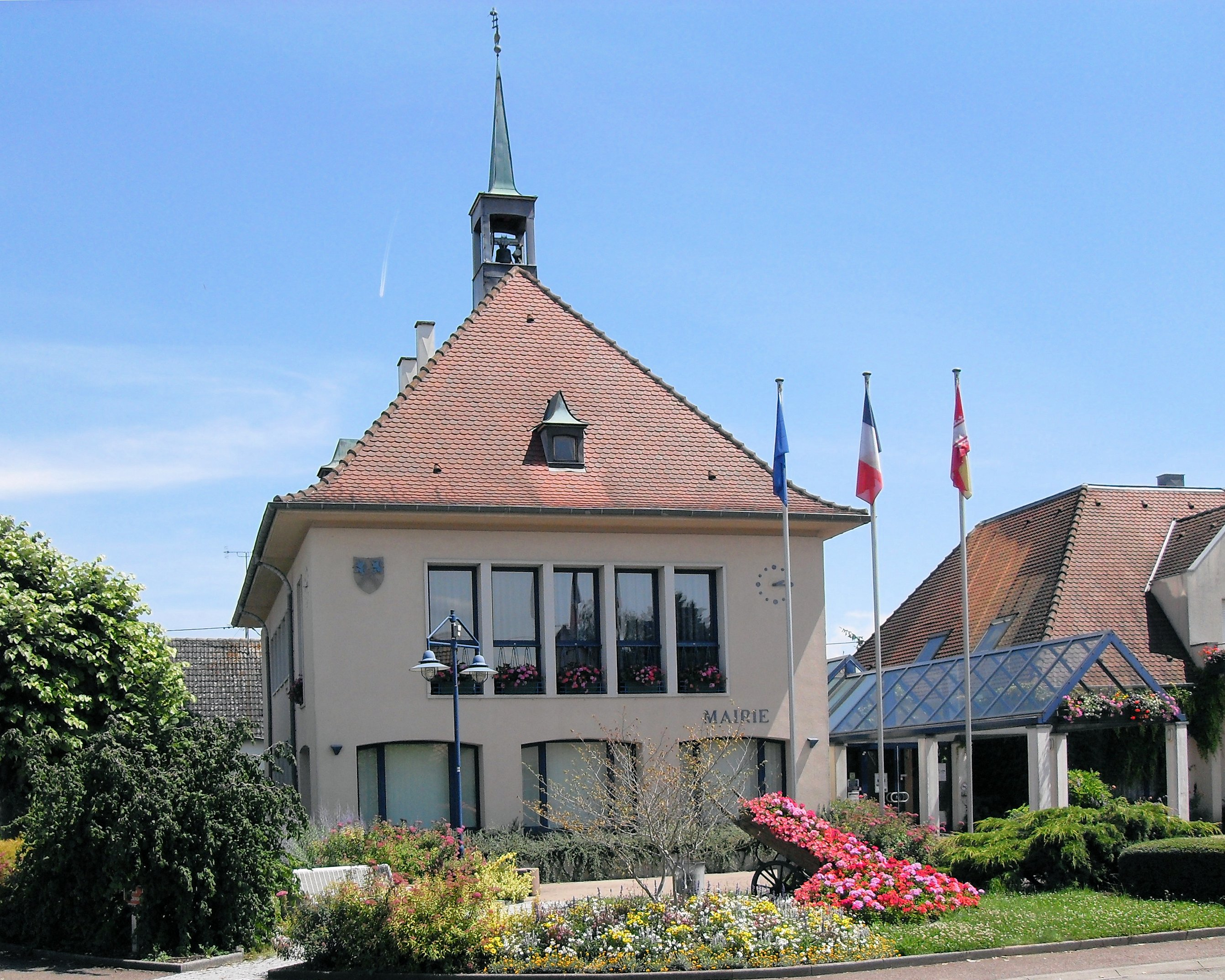 La mairie de Volgelsheim